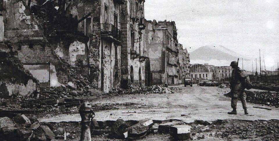 Napoli, via Marina dopo i bombardamenti degli alleati. In fondo si riconosce il Mercato Ittico. Autore sconosciuto.